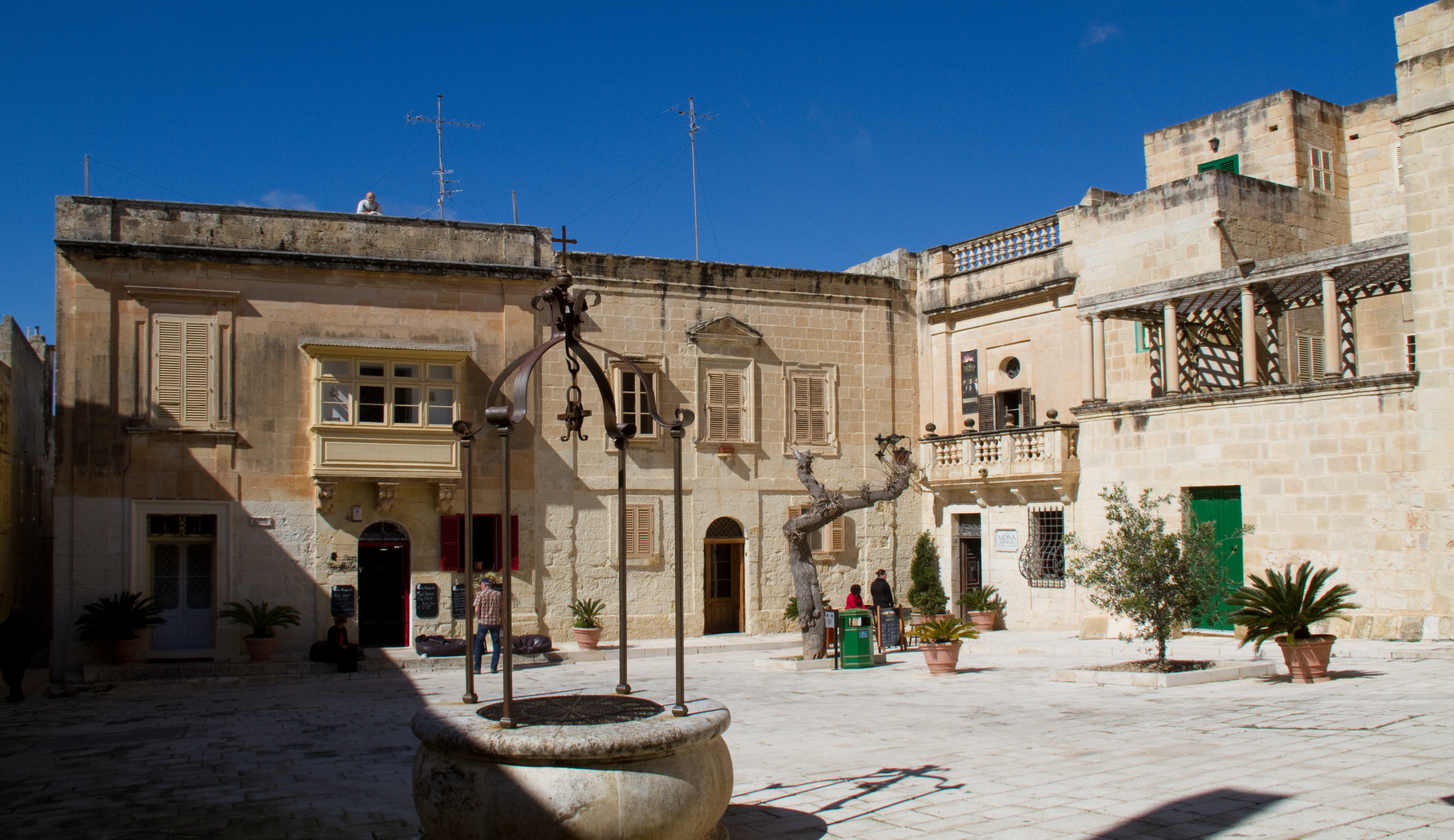 Mdina 3